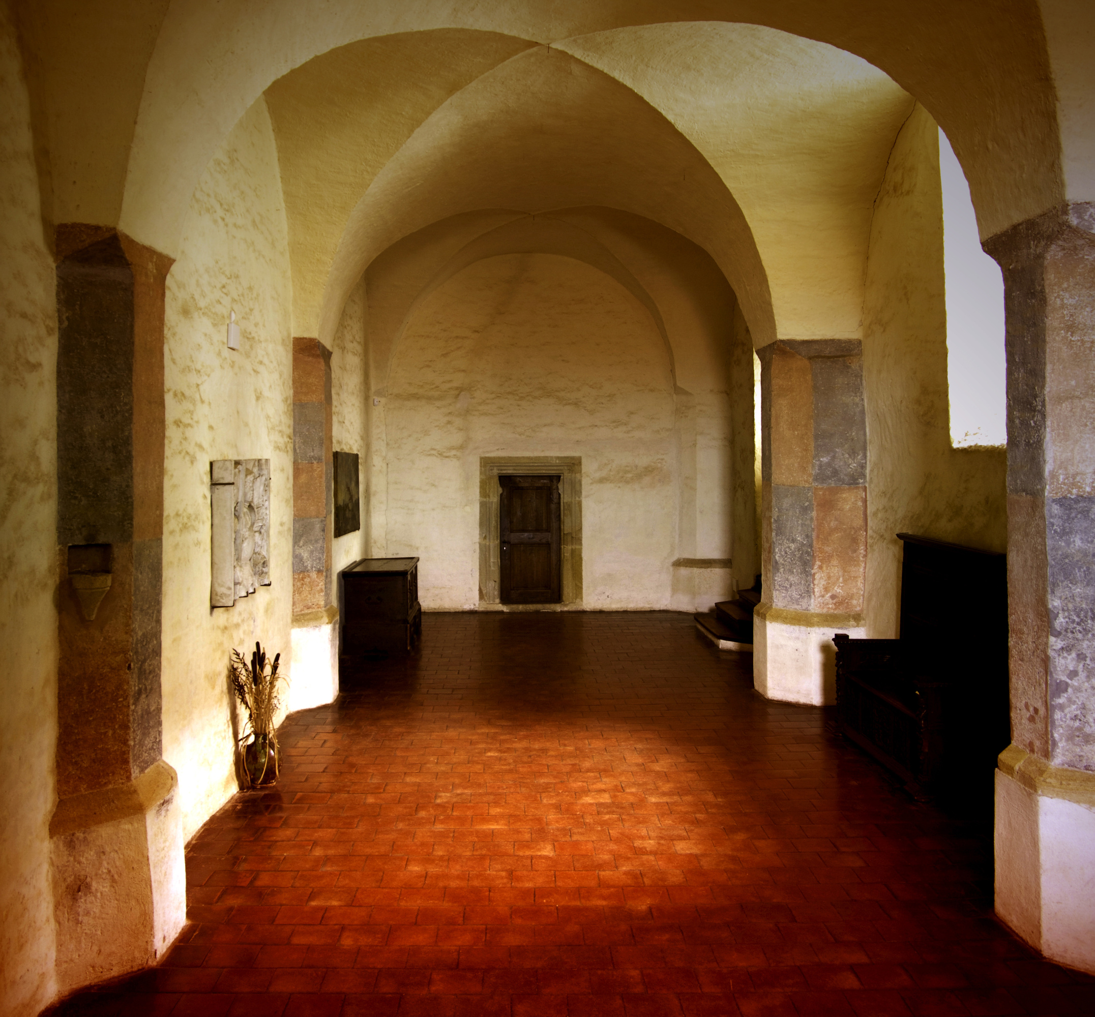 Hrad Švihov, Švihov.